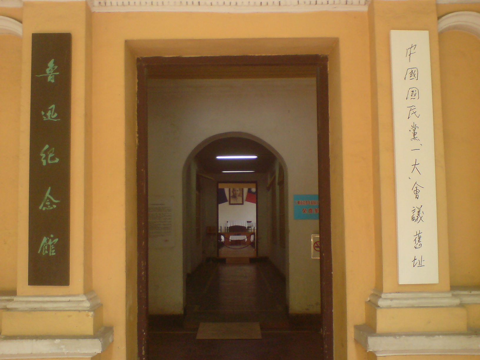 广东省博物馆鲁迅纪念馆和国民党一大会址